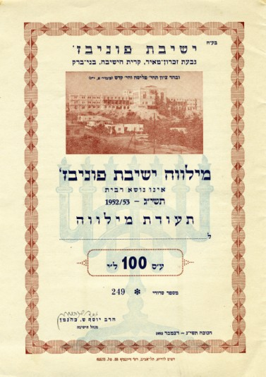 תעודת מלווה של ישיבת פוניבז על סך 100 ל"י, 1953